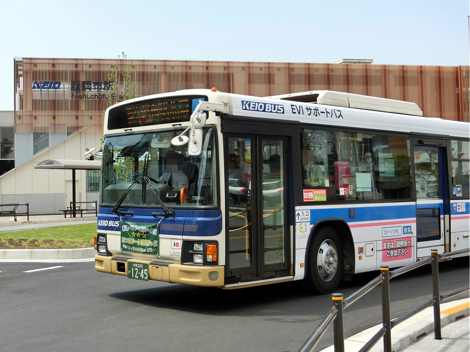 2017年4月17日より、京王バスが西調布駅のロータリーに乗り入れ開始。